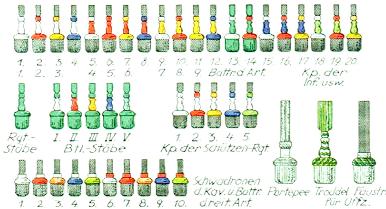 Farben der Troddeln und Faustriemen der Wehrmacht. Als Merksatz für die Zuordnung der Farben gab es den Spruch: Wir = weißrauchen = rotgerne = gelbbillige = blauegute = grünBrasil = braun